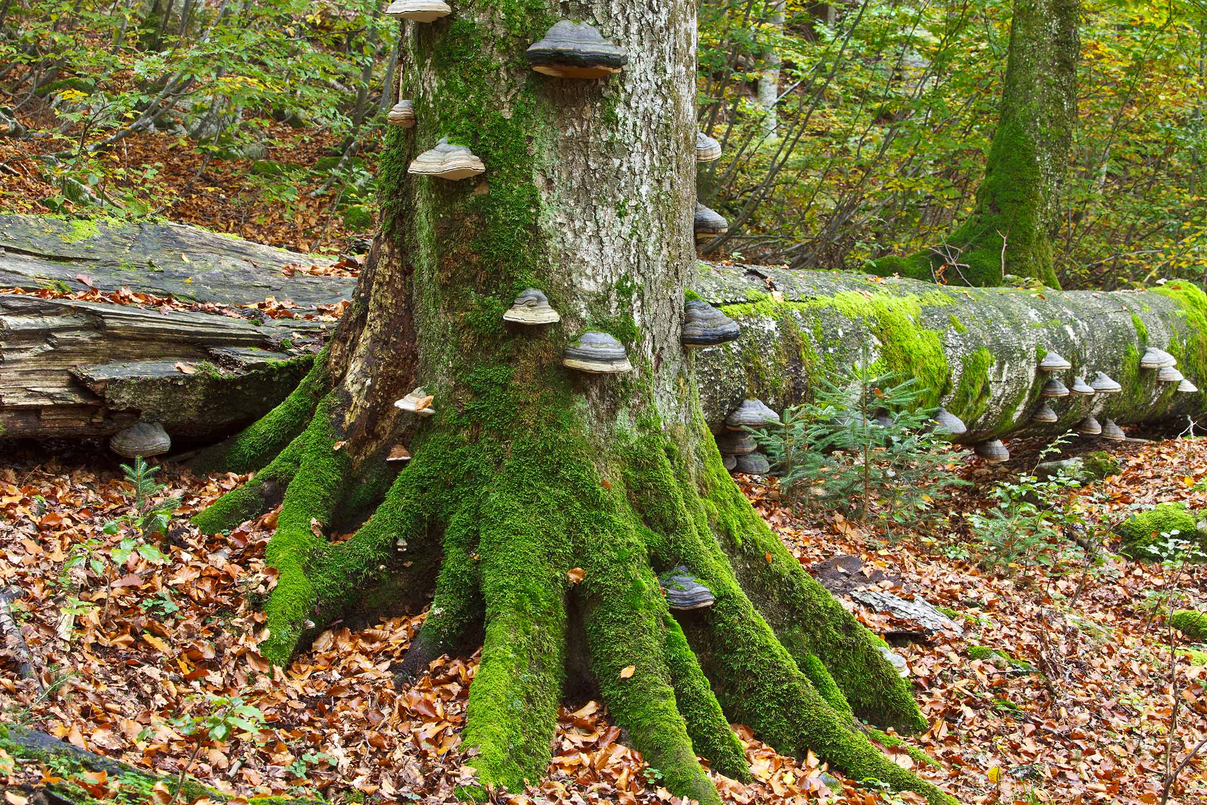 Rothwald